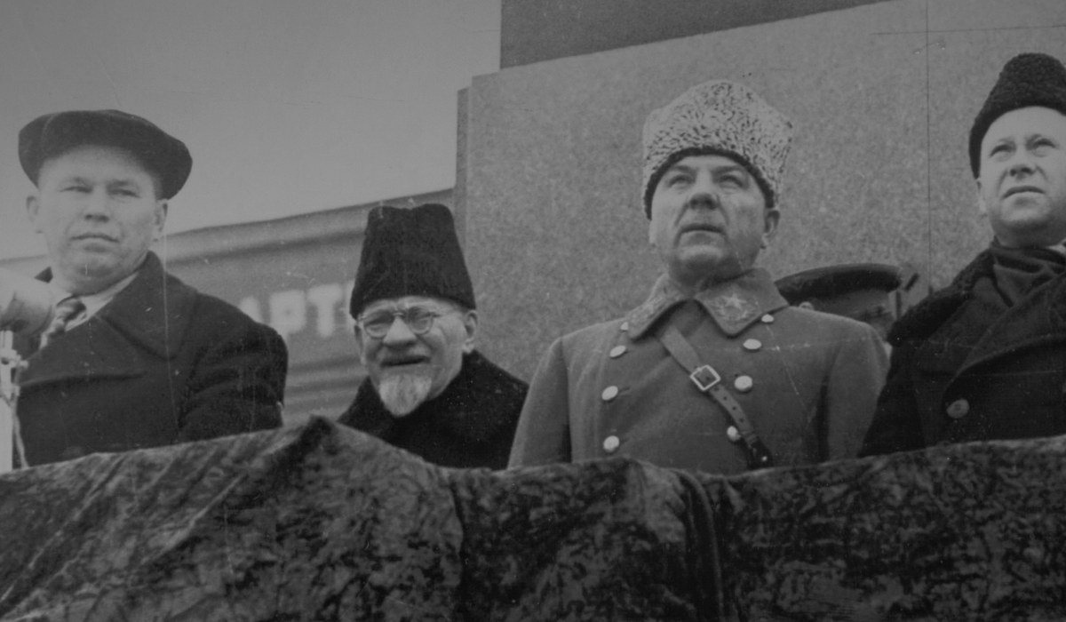 Председатель куйбышевского облисполкома Н. Журавлев, М. Калинин и К. Ворошилов. Военный парад в Куйбышеве 7 ноября 1941 г.